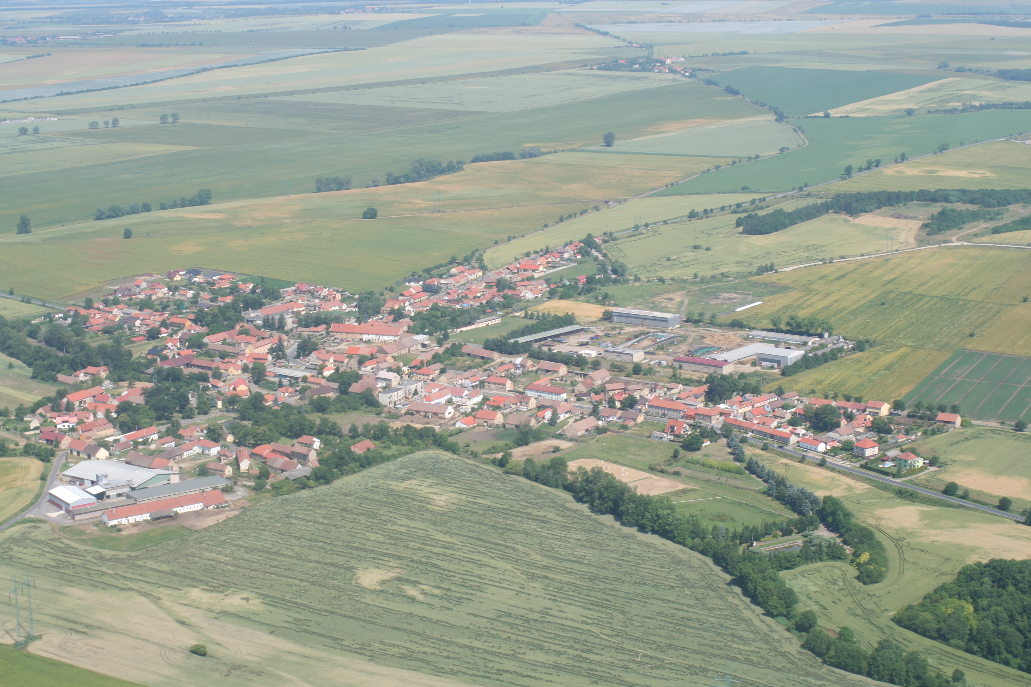 Černuc (okr. Kladno), letecký pohled od JV